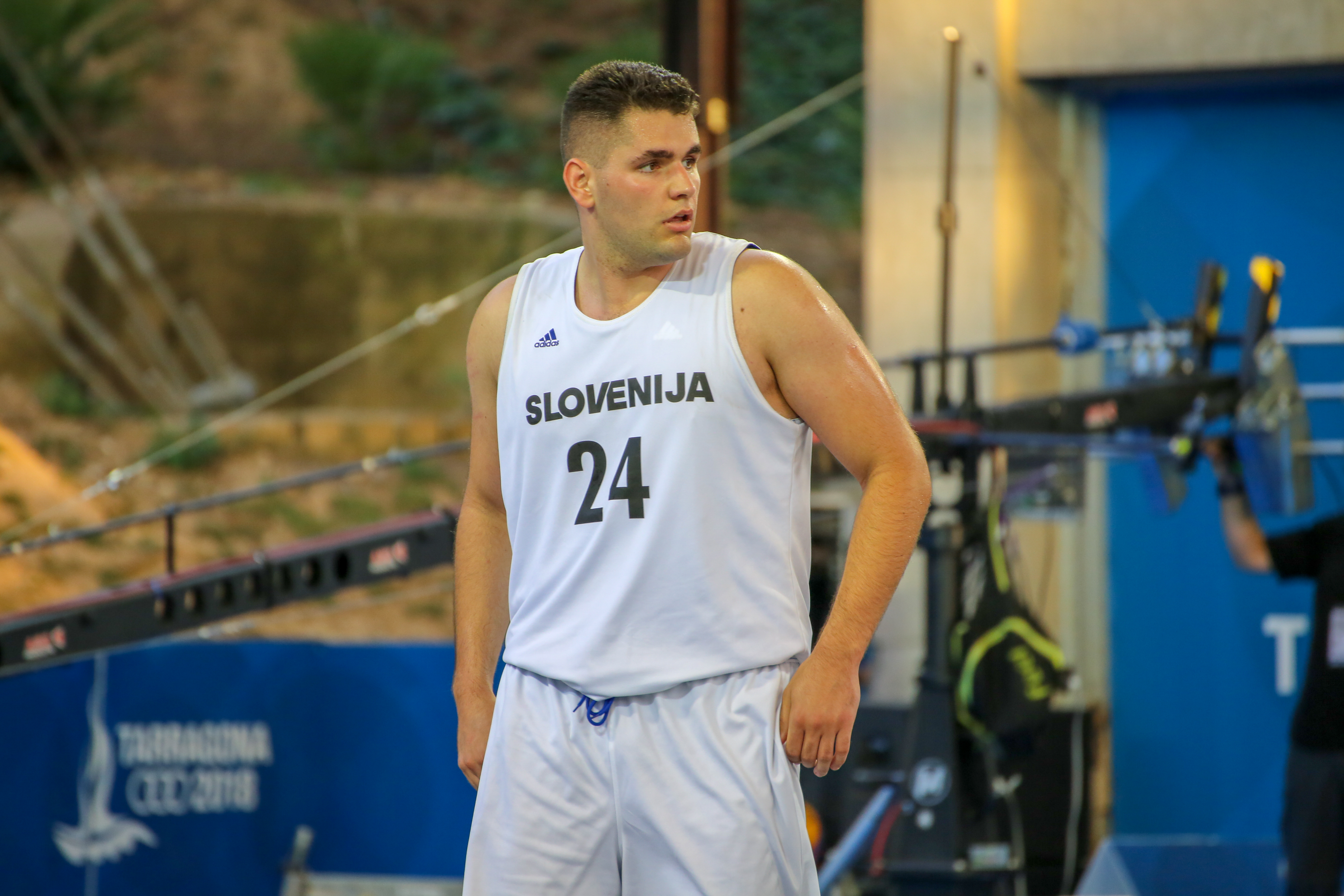 Dejan Trnjak en los Juegos del Mediterráneo 2018